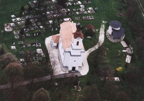 Kapolcs, Hungary, aerialphotgraphy. Szentháromság római katolikus templom